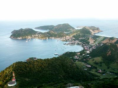 Vue de l'ile principale des Saintes (Guadeloupe) depuis le point culminant, Le Chameau (alt. 309 m.) photographie prise en décembre 2003 par Utilisateur:JC (Exether) Catégorie:Image de la Guadeloupe